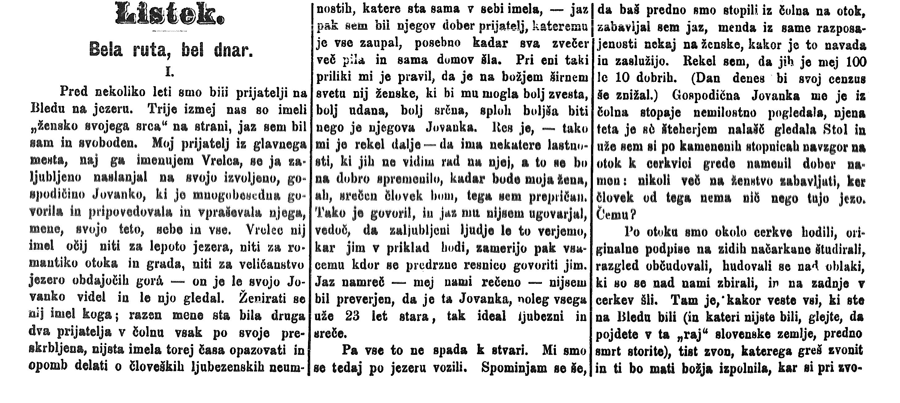 Začetek besedila Josipa Jurčiča Bela ruta, Bel denar iz časopisa Slovenski narod iz leta 1874.